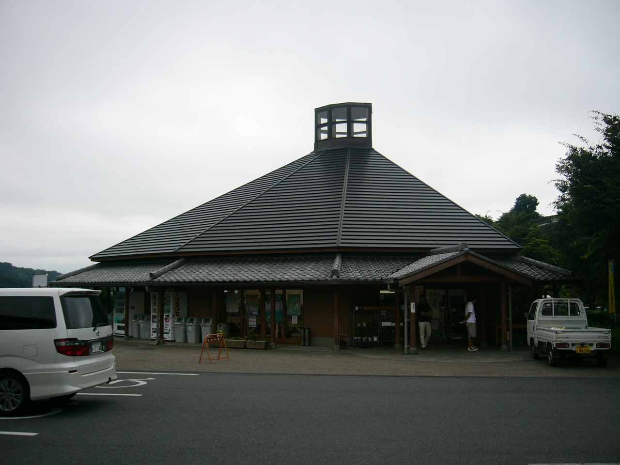 Michinoeki Tsukiyono Yaze Shinsuikoen (Gunma)(道の駅月夜野矢瀬親水公園)